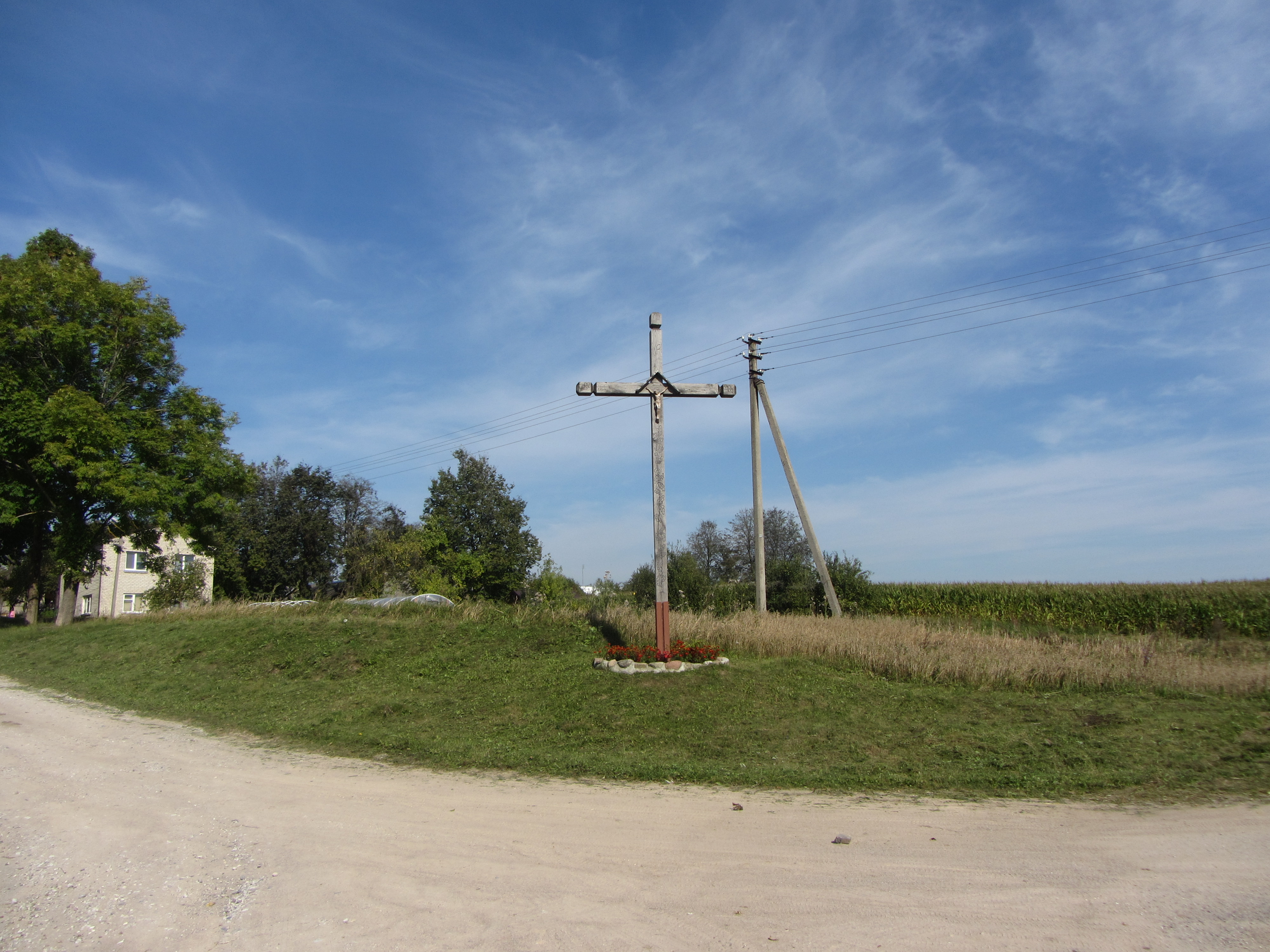 Druckūnai 65402, Lithuania